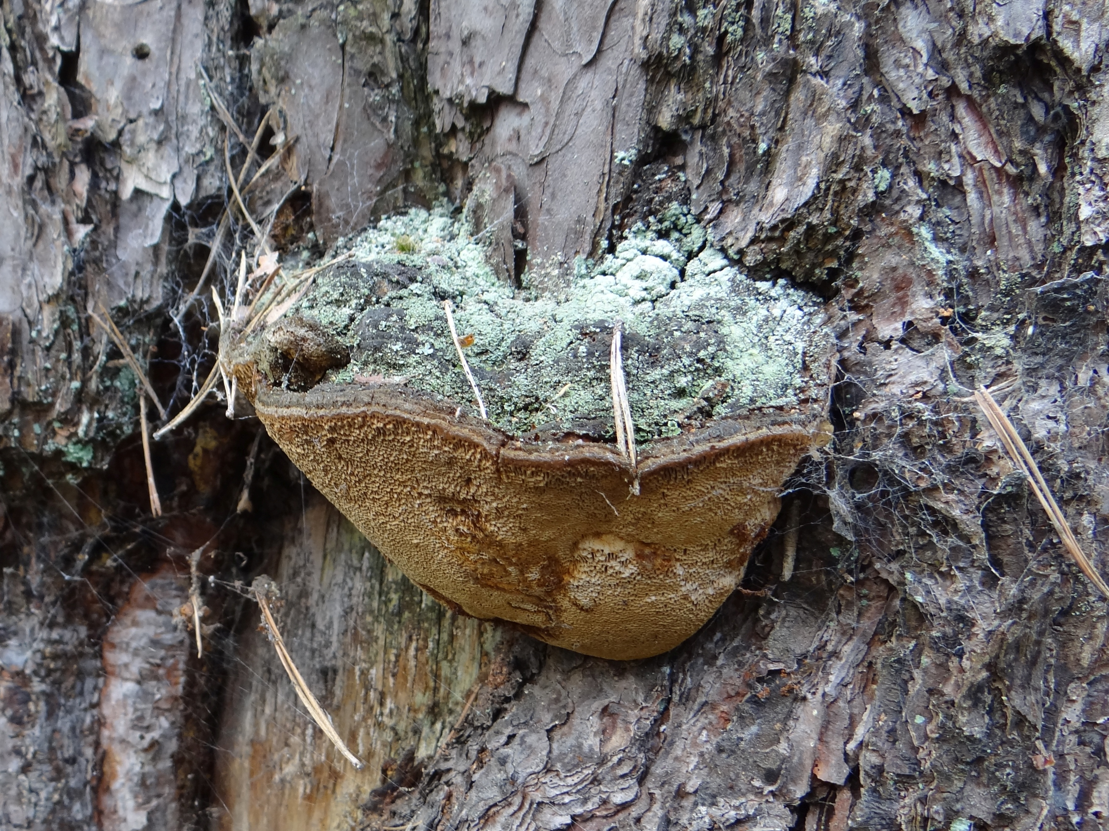 Porodaedalea pini. Location: Poland, Krynica Morska